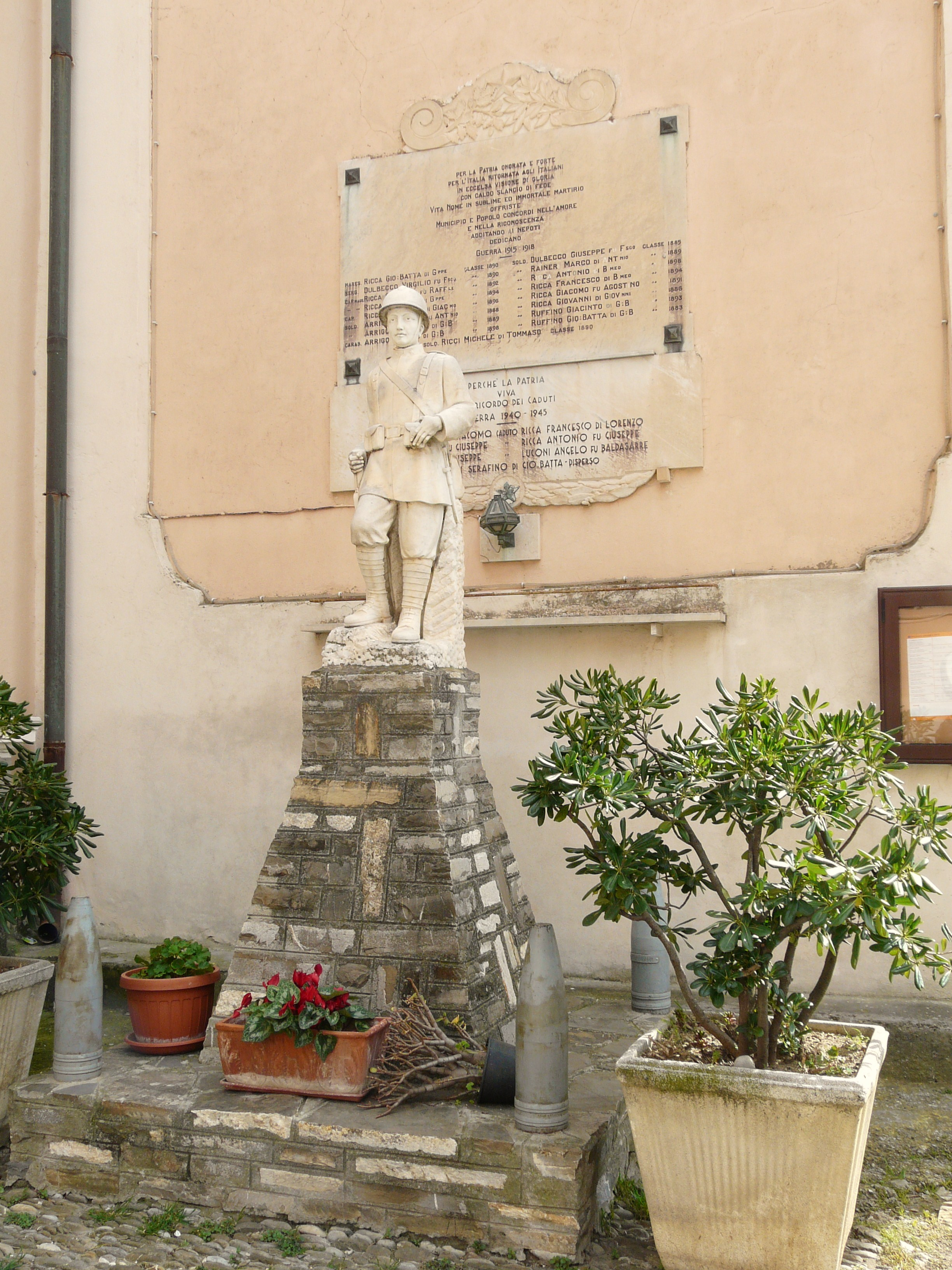 Monumento ai caduti, Civezza, Liguria, Italia